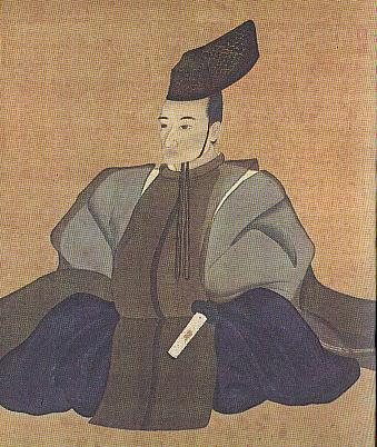 Porträt von Matsudaira Sadanobu